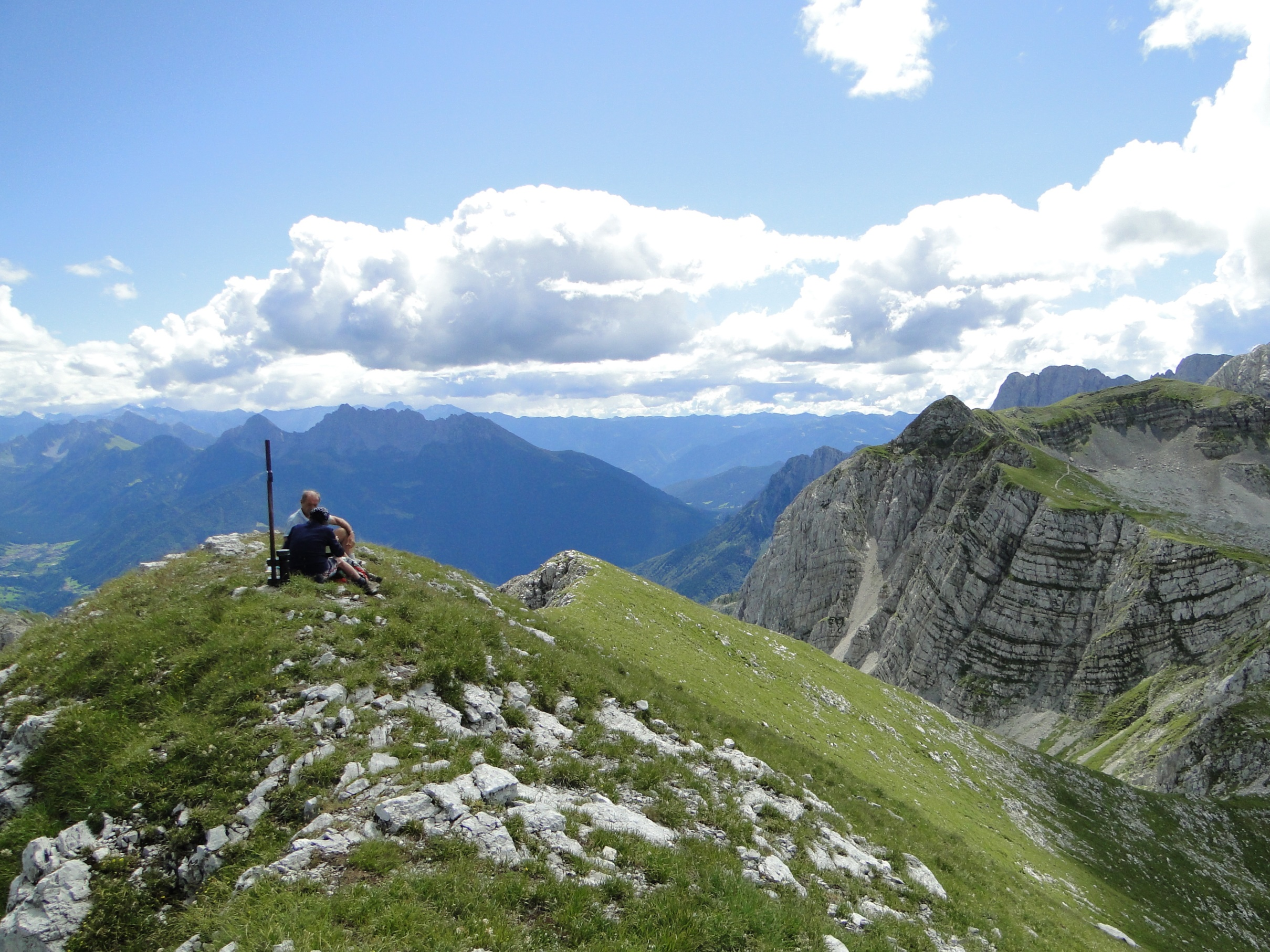 Vetta del monte Vigna Vaga. Prealpi bergamasche (BG). Italy